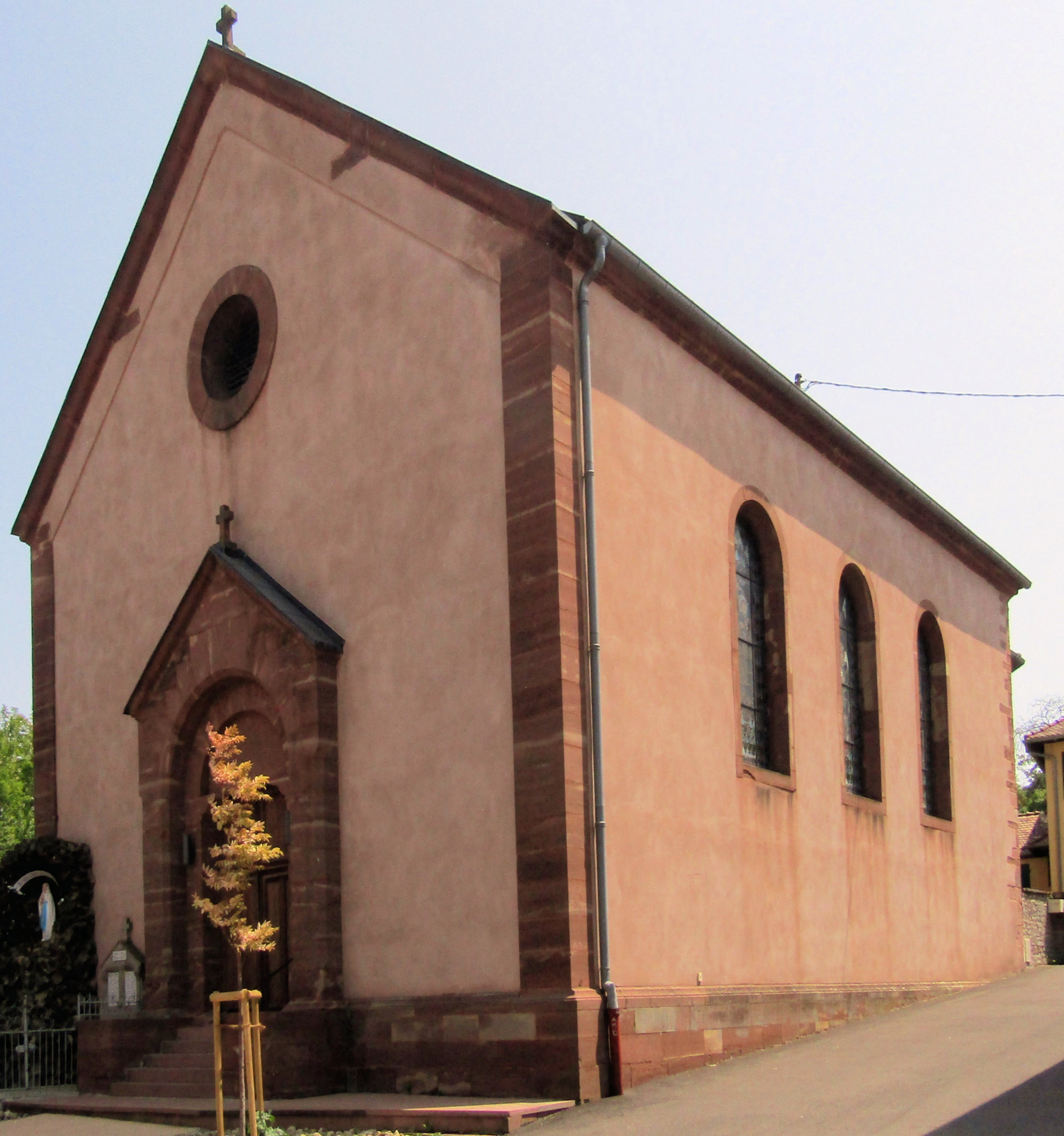 L'église Saints-Côme-et-Damien à Zeinheim